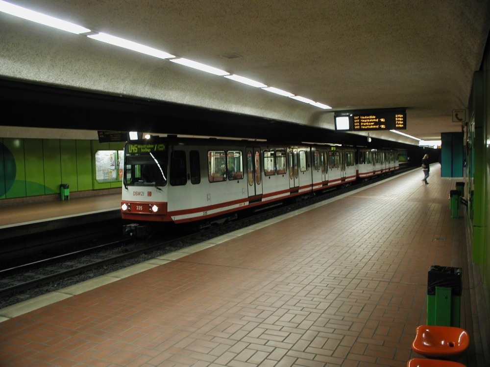 DSW Tw 335 in der Haltestelle Stadtgarten